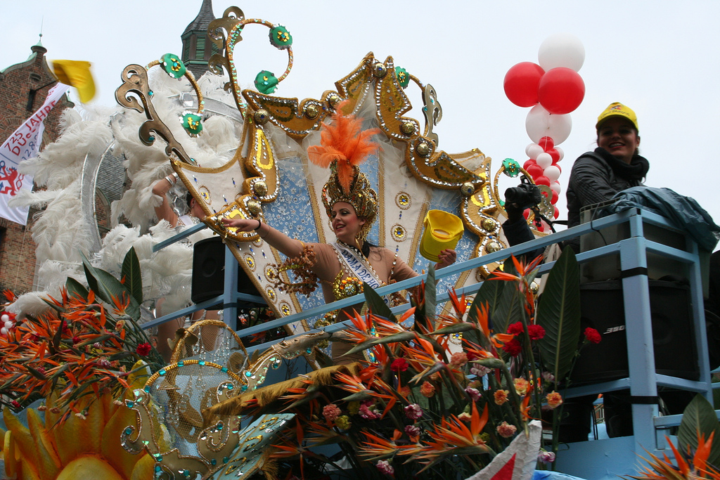 Düsseldorf Karneval 2013